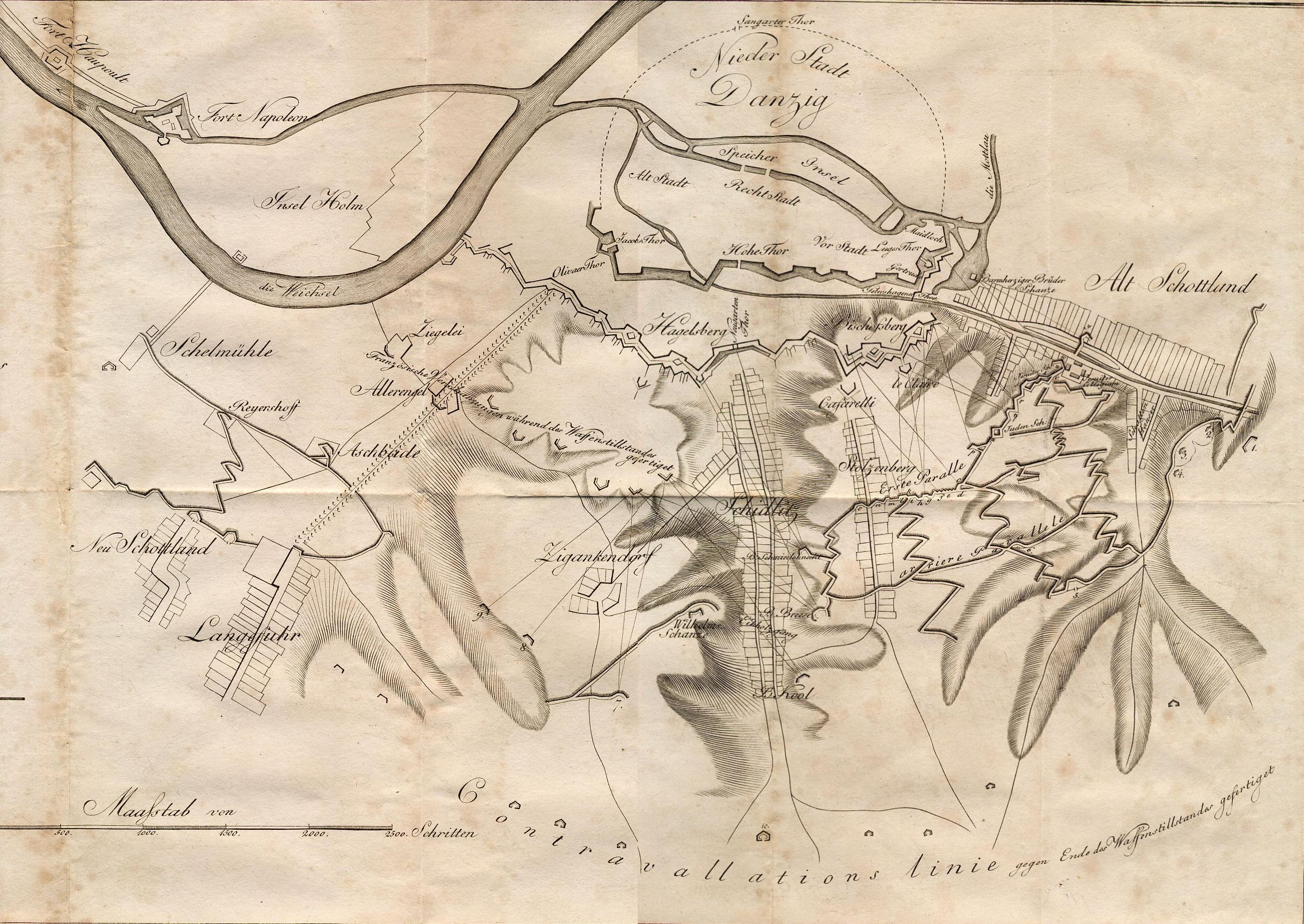 Situationsplan der Blockade und Belagerung von Danzig im Jahr 1813 mit darstellung sämtlicher Belagerungsarbeiten.